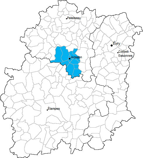 Carte de localisation du canton d'Arpajon en Essonne (91)